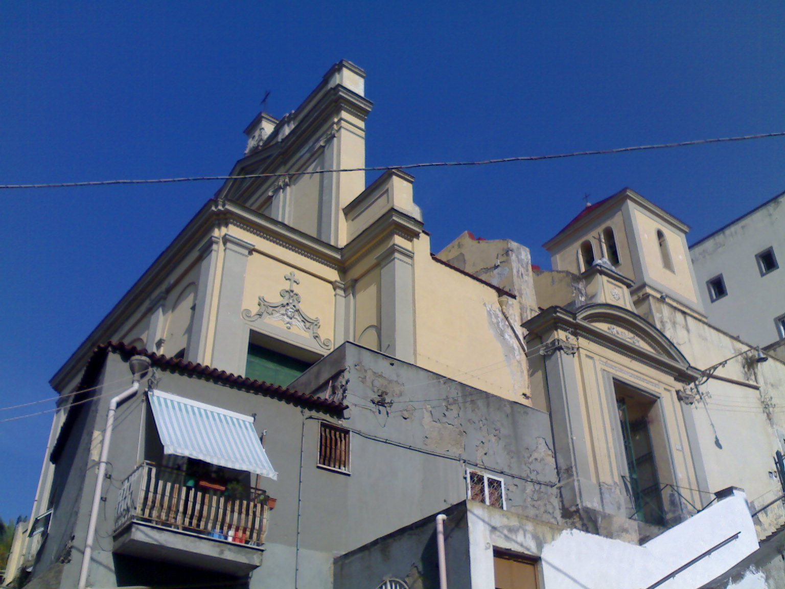 Chiesa di San Nicola da Tolentino (Napoli, esterno)